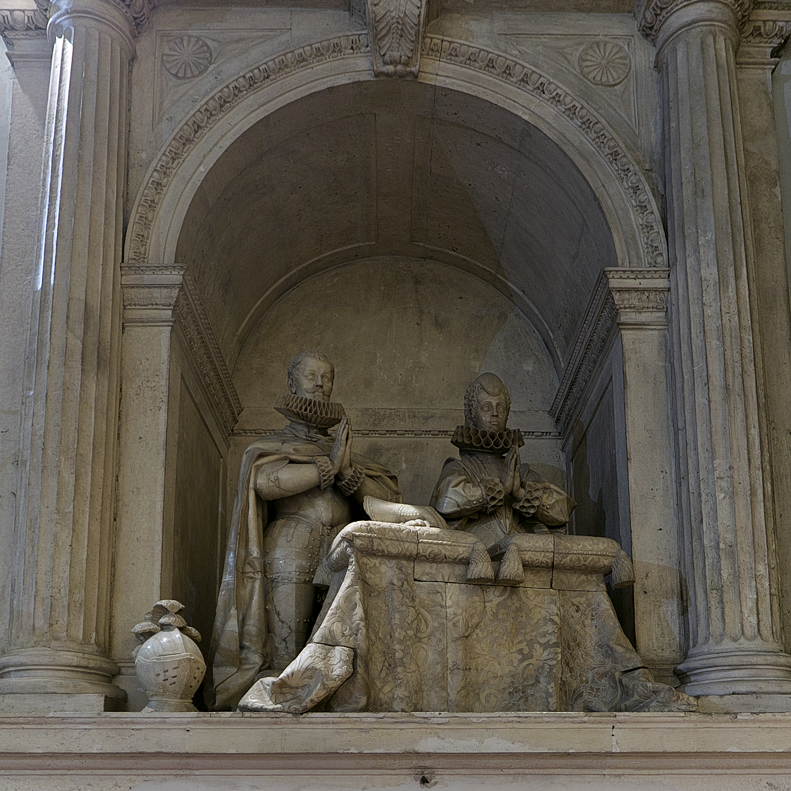 Iglesia de San Miguel y San Julián (Valladolid). Figuras orantes de Juan Pérez de Vivero (†1610) y Magdalena de Borja, primeros condes de Fuensaldaña, obra de Gregorio Fernández (1611-1617) talladas en alabastro. Contratado con Francisco de Praves en piedra.